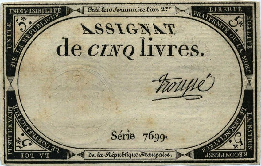 5 Livres 1793 averse = uni